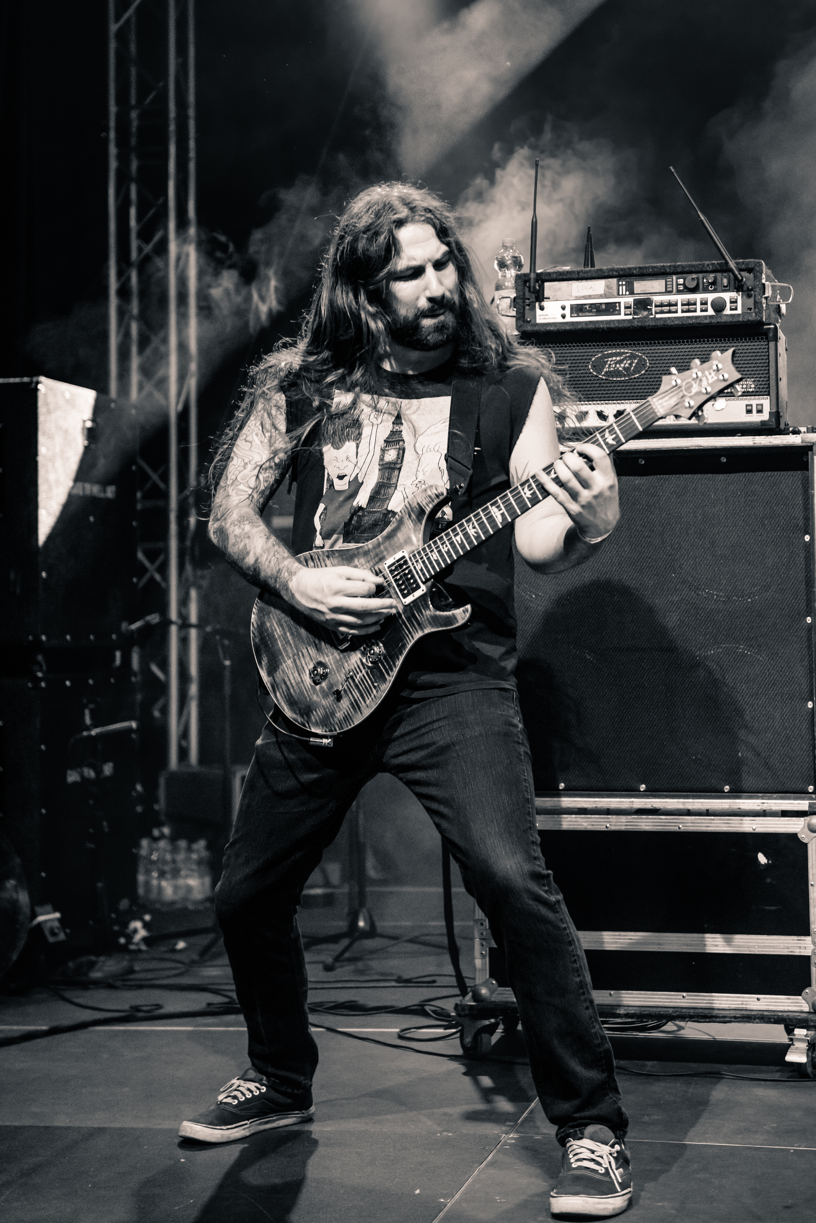 'Dong Open Air 2015; Neukirchen-Vluyn Halde Norddeutschland': 'The Black Dahlia Murder'